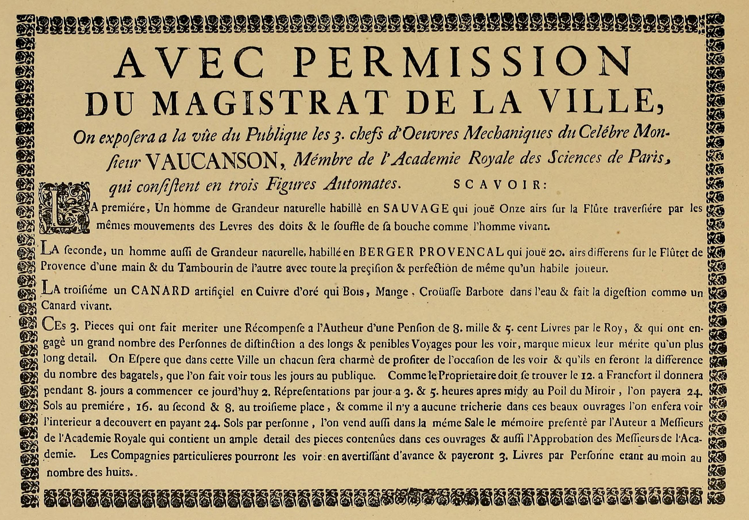 Illustration from Histoire des jouets